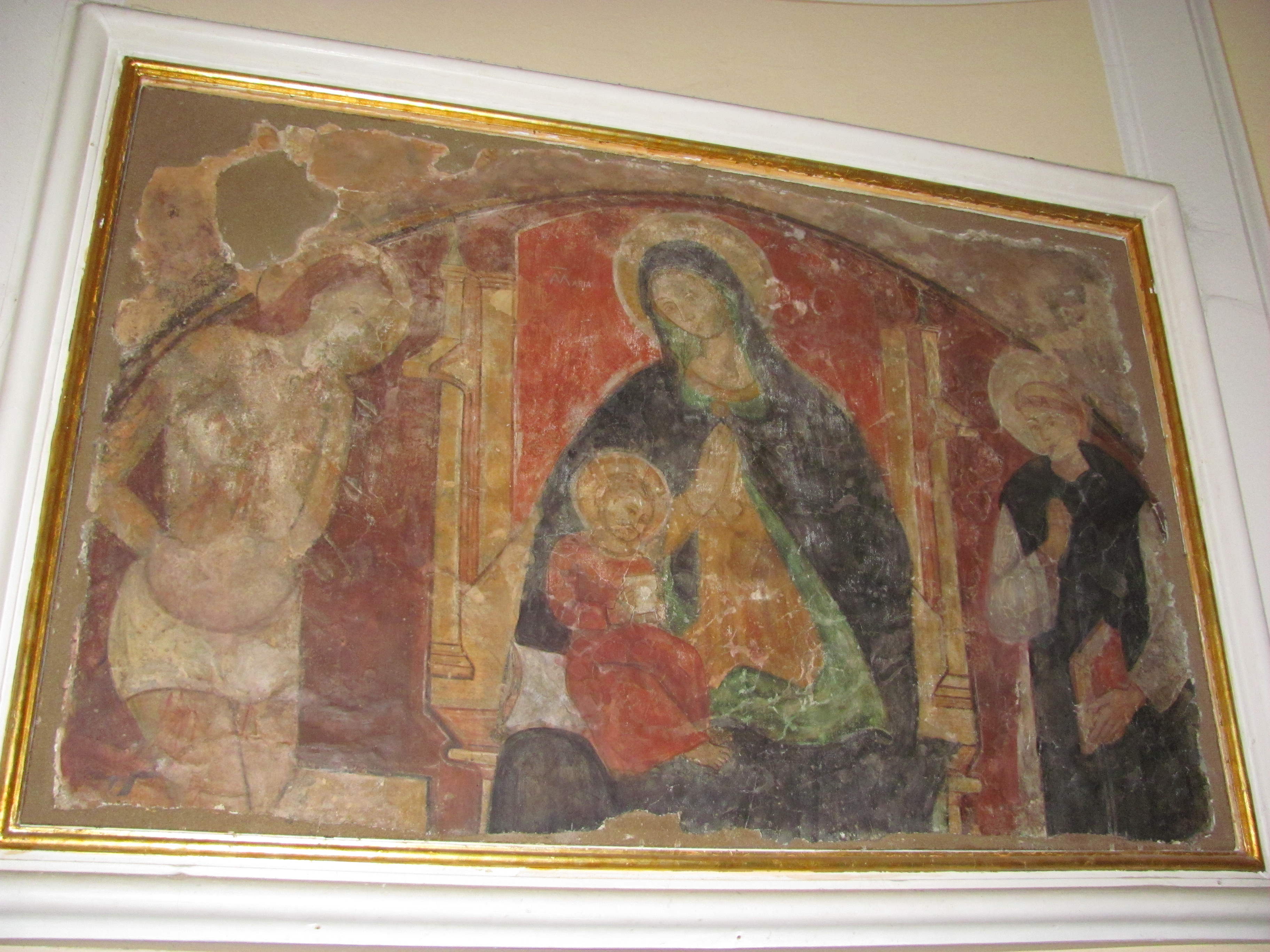 Chiesa di Maria Santissima Annunziata - Affresco Madonna della Consolazione SIANO SA (dicembre 2010)